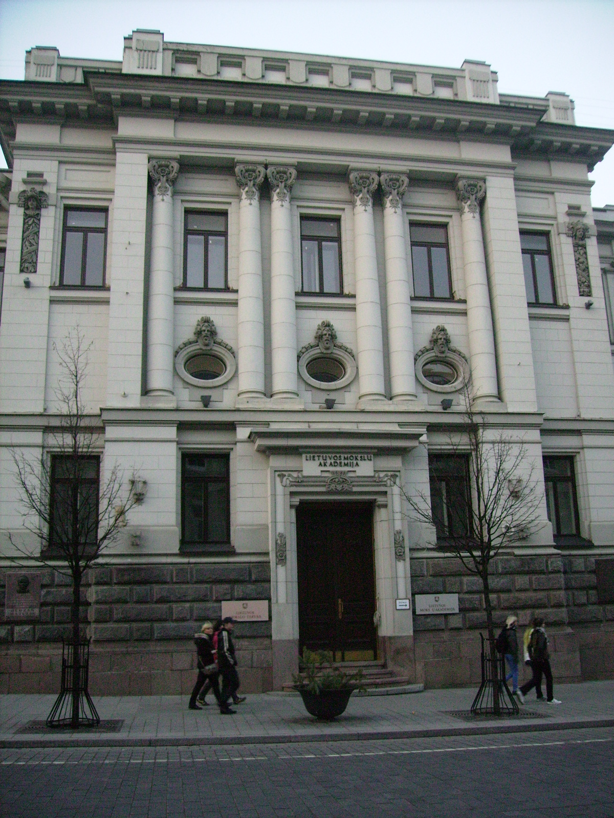 Lietvos Mokslu Akademija Vilniuje